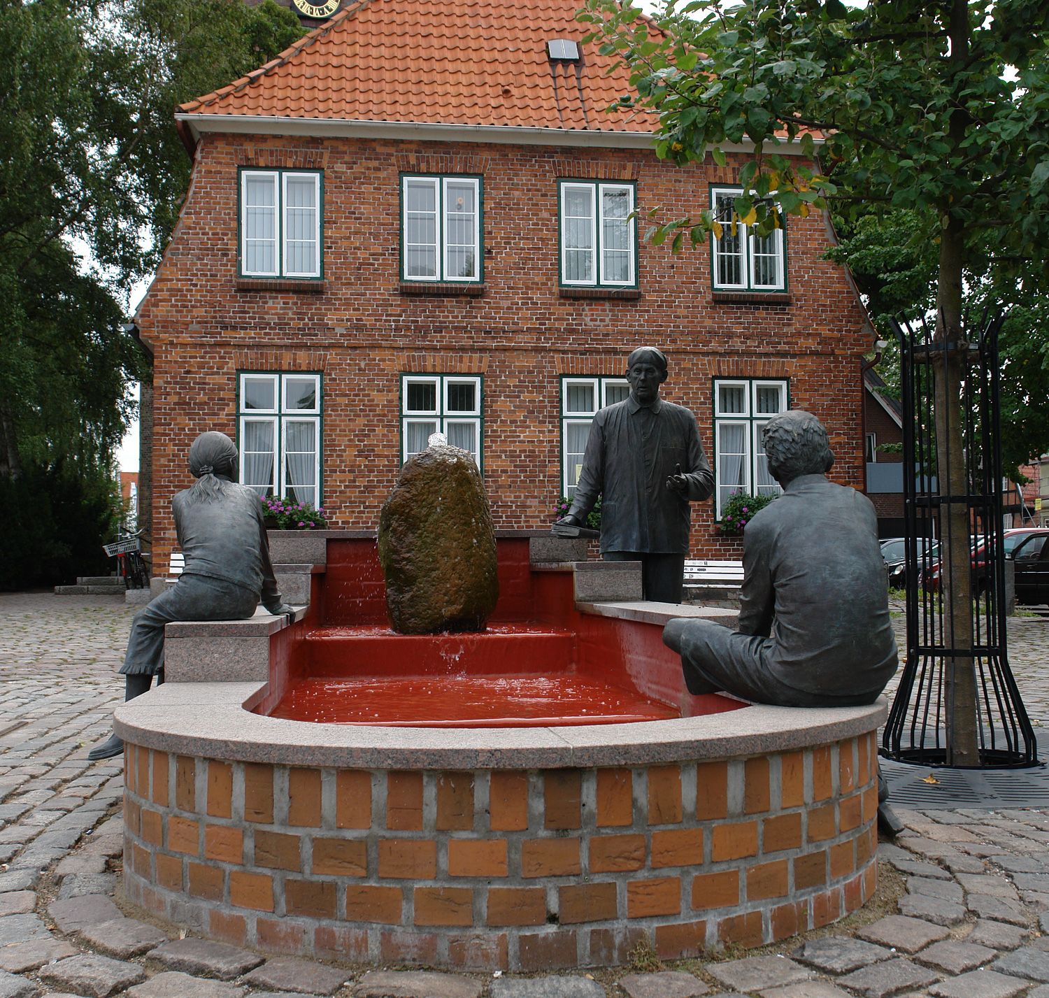 Lübeck-Travemünde: Timmermann-Brunnen auf dem alten Marktplatz